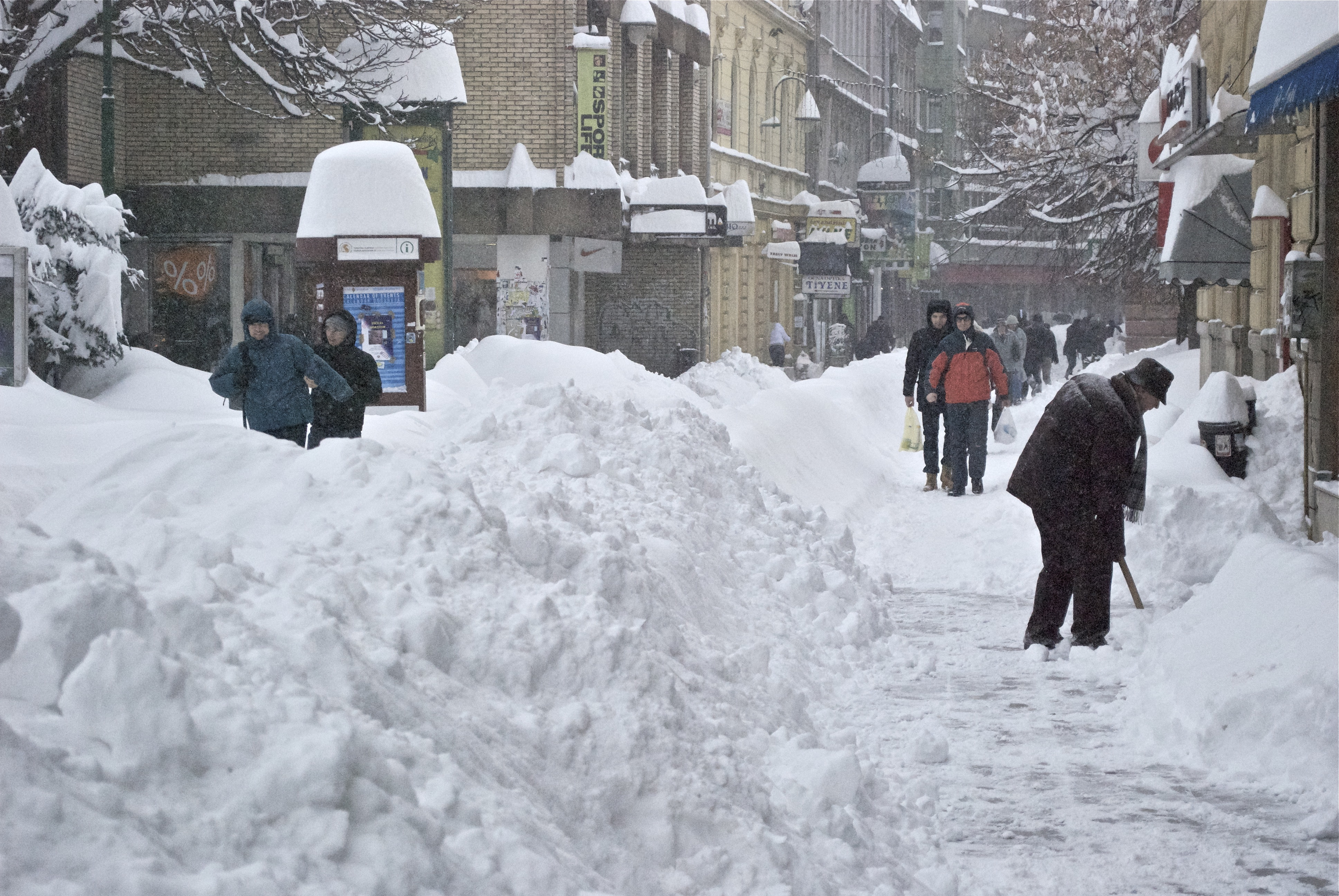 Přívaly sněhu v Sarajevu, únor 2012